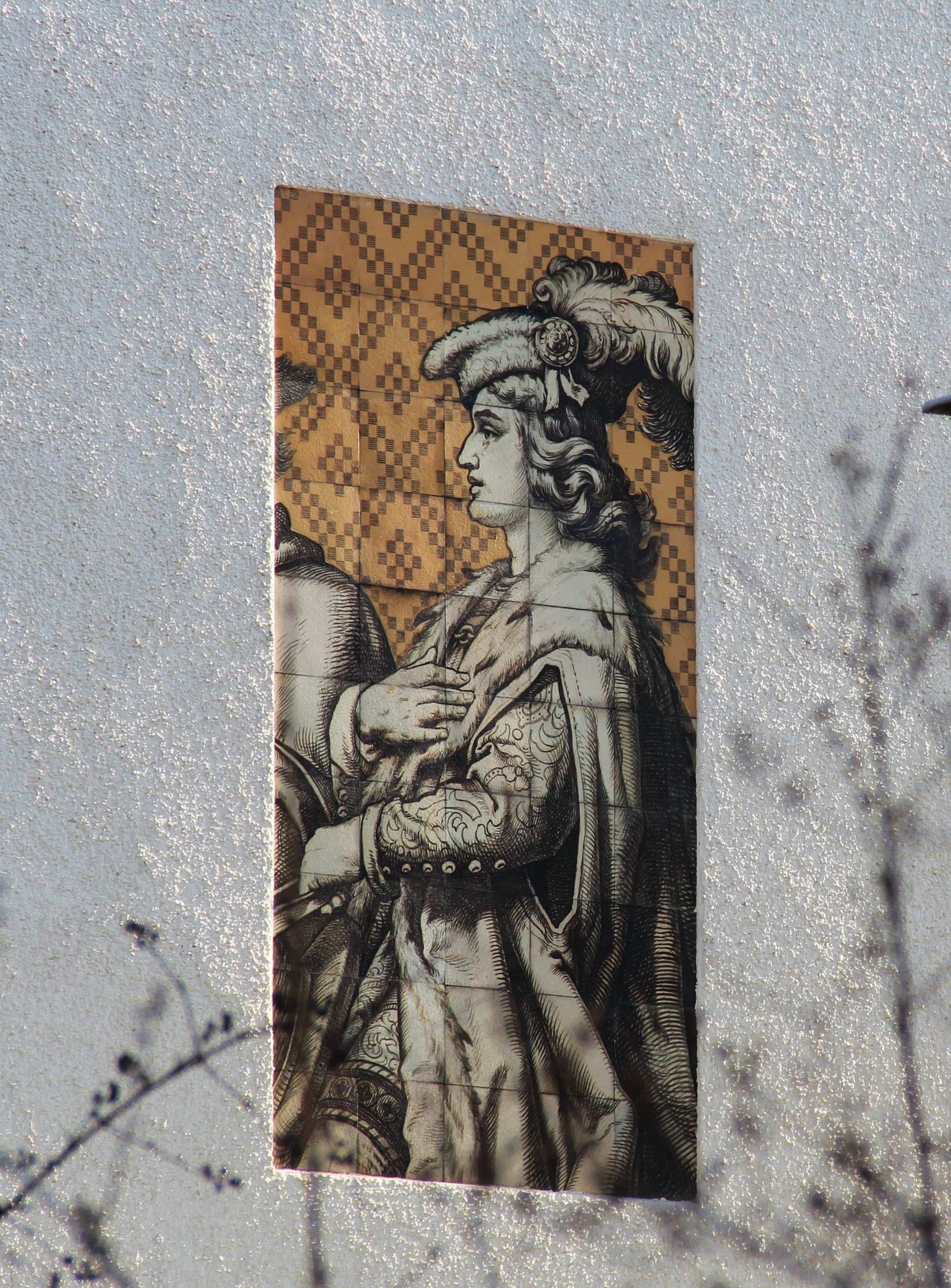 Probebild aus 50 Keramikfliesen mit Markgraf Friedrich dem Ernsthaften an einer Wand der Porzellenmanufaktur Meißen